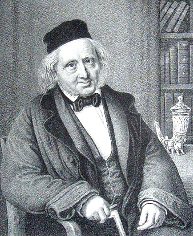 Bernhard Severin Ingemann (f. 28. maj, 1789 i Torkilstrup - d. 24. februar, 1862 i Sorø) var en dansk salmedigter og forfatter af historiske romaner.